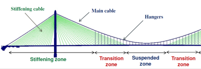 Schéma mostu s různými užitečnými informacemi.